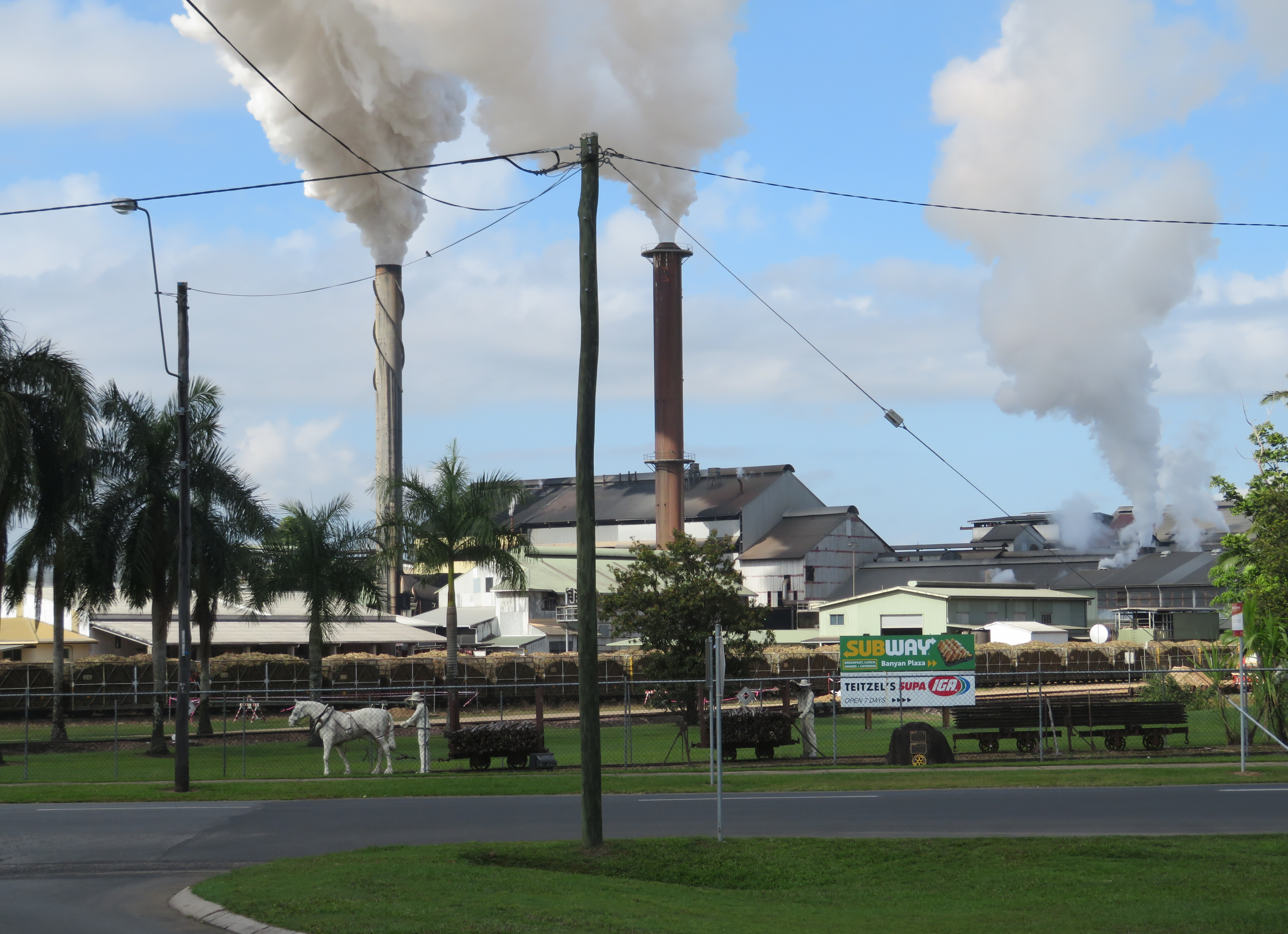 Denkmal und Zuckerfabrik in Tully, Queensland, Australien